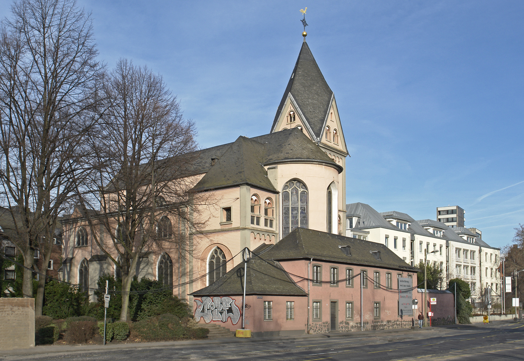 St. Maria in Lyskirchen, Ansicht vom Rheinufer aus This is a photograph of an architectural monument.